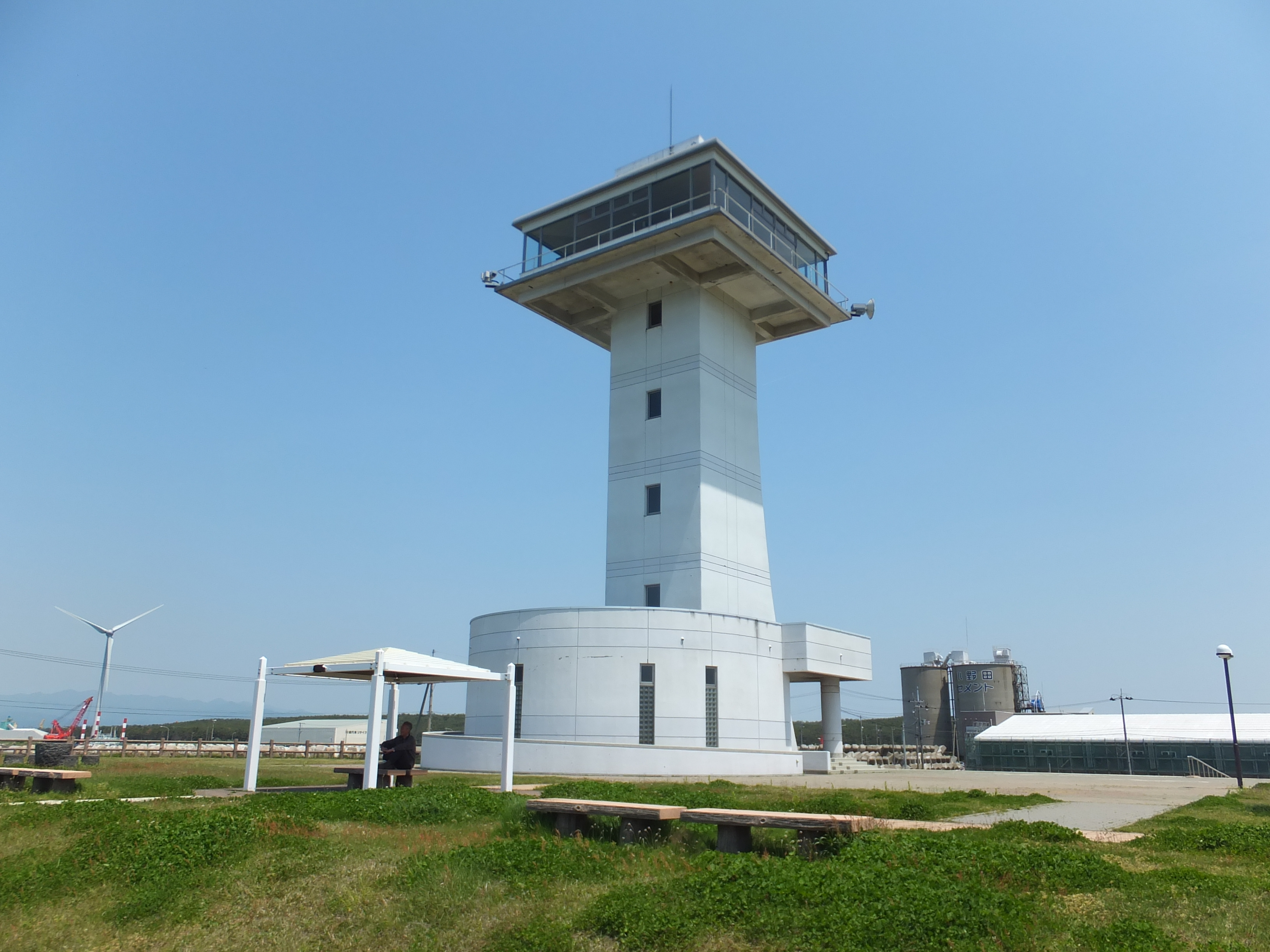 秋田県能代港にあるはまなす展望台